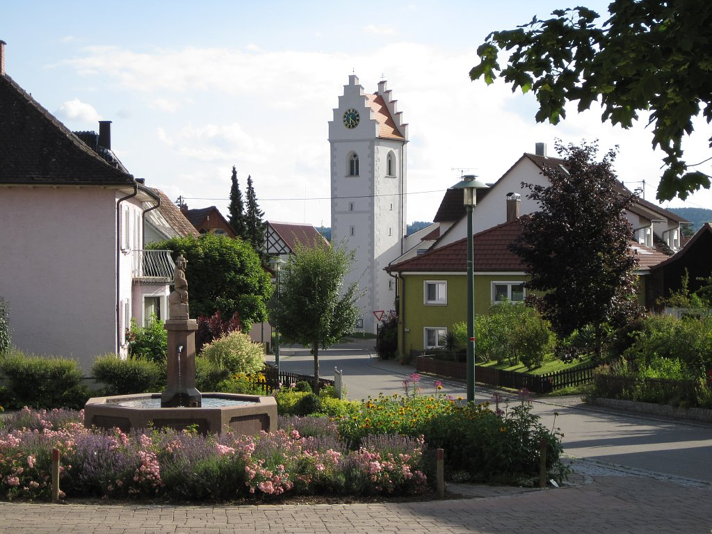 Blick auf die Pfarrkirche St. Antonius in Großschönach, im Vordergrund der Dorfbrunnen